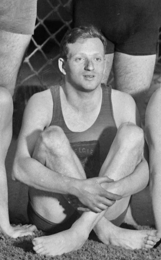 30-12-22, match France-Belgique, équipe de water-polo belge : Gérard Blitz : [photographie de presse] / [Agence Rol]